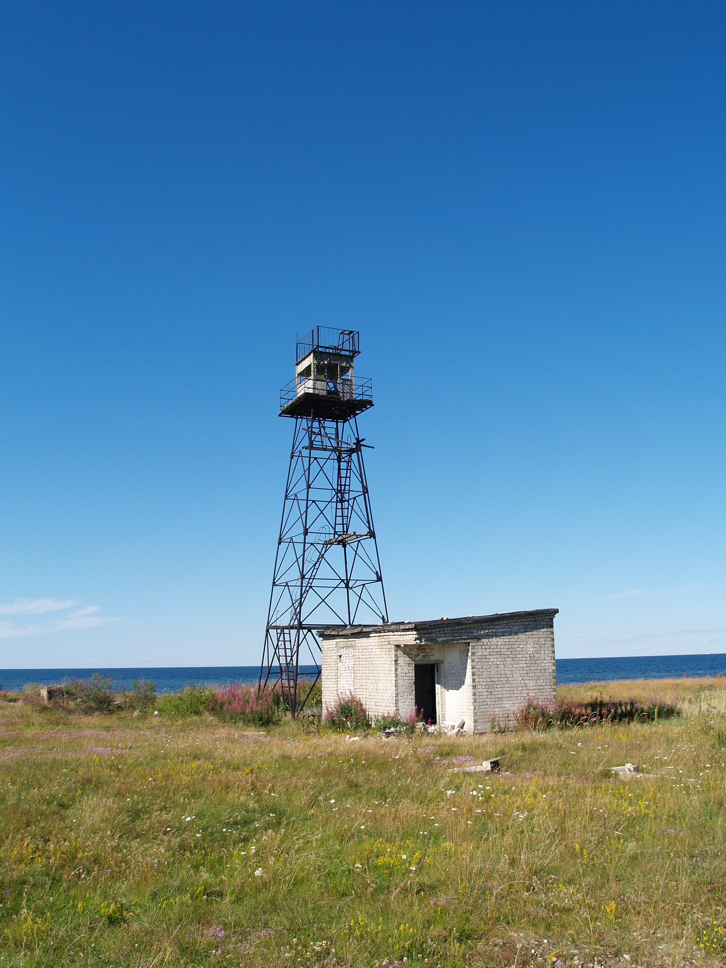 Endine piirivalve vaatlustorn Uitru säärel.